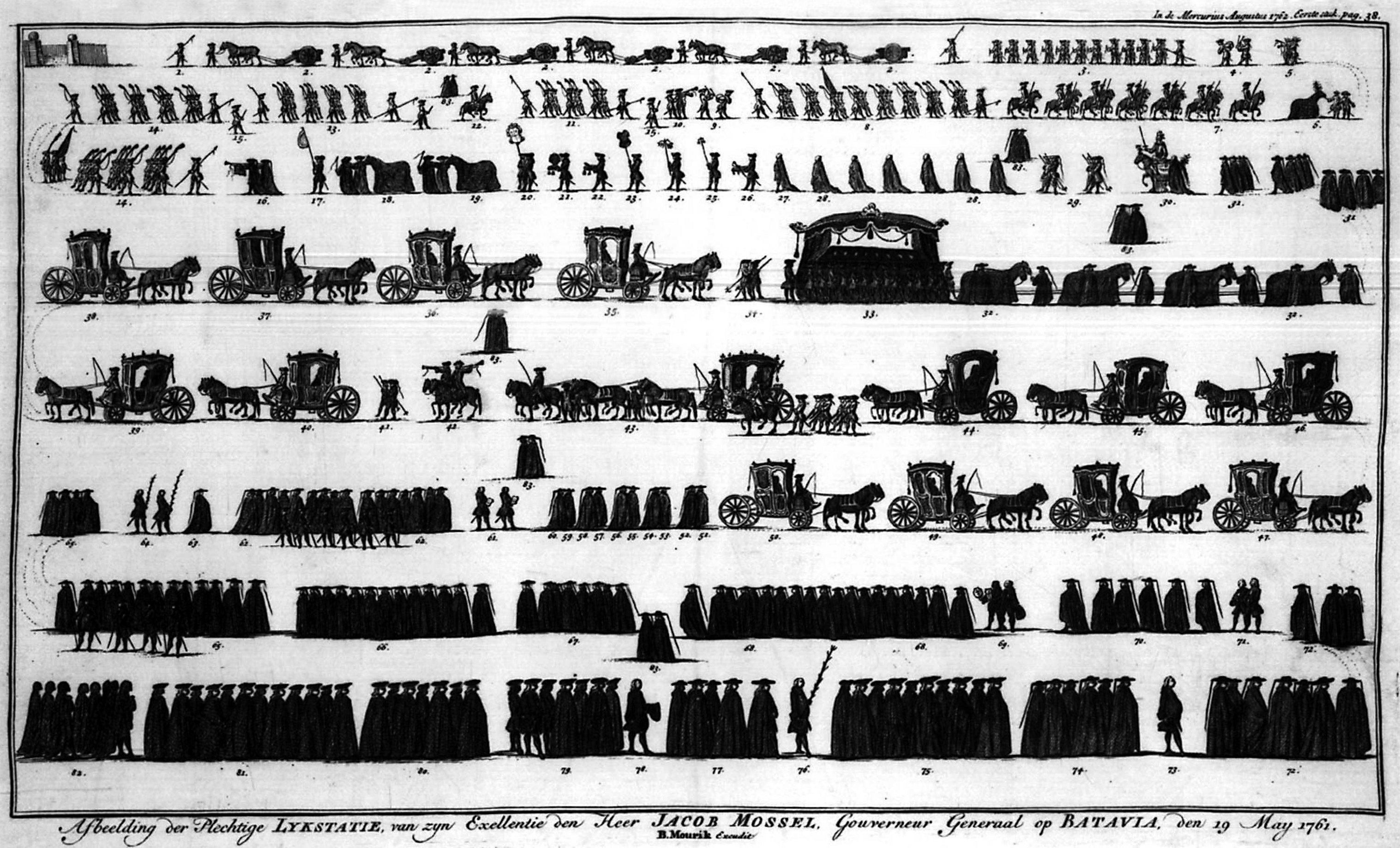 Afbeelding der plechtige Lykstatie van zijn Excellentie den Heer Jacob Mossel, Gouverneur Generaal op Batavia, den 19 May 1761. te zien zijn acht rijen met mensen, paarden en rijtuigen waaronder één met een grote kist met baldakijn met 8 paarden ervoor. Legenda: 1-72; zonder verklarende tekst.